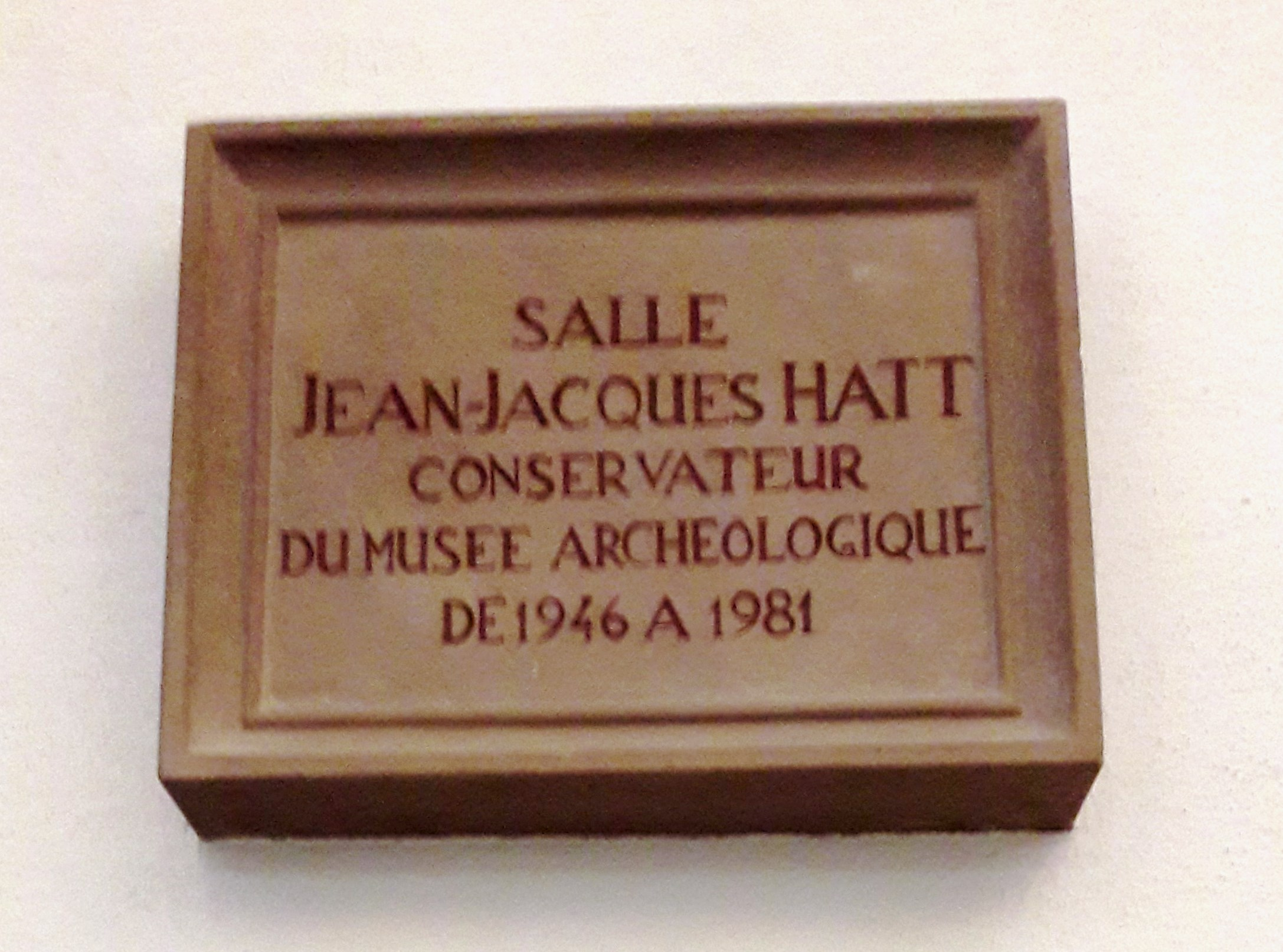 Plaque dédiant une salle du musée archéologique de Strasbourg à Jean-Jacques Hatt.